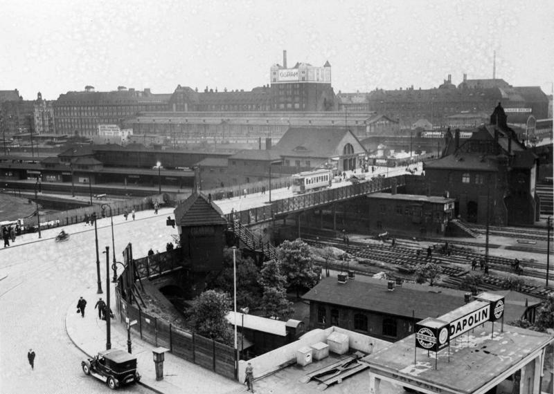 Berlin, S-Bahnhof Warschauer StrasseADN-ZB/ArchivBerlin 1930Blick auf die Warschauer Brücke und den S-Bahnhof Warschauer Straße, im Hintergrund die Fabrikanlagen von OSRAM16113-30 Information added by Wikimedia users.Berlin-Friedrichshain; Blick von Norden (etwa Helsingforser Platz) über die Warschauer Brücke und den S-Bahnhof Warschauer Straße (in Bildmitte) auf die Wagenhalle der Hochbahn (heute Rudolfhalle) und die Fabrikgebäude der Osram (später Narwa, heute Oberbaum City)